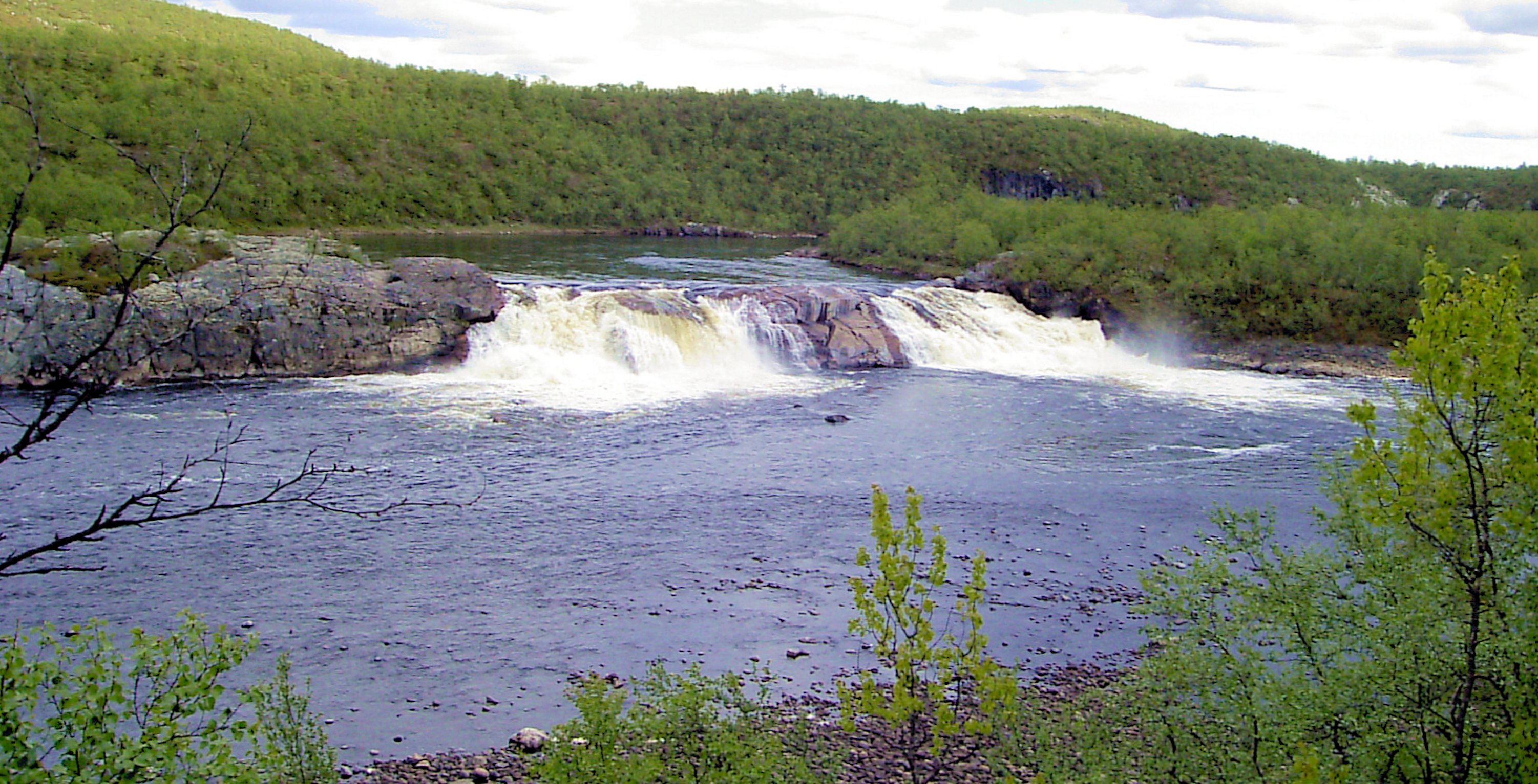 Davvisámegiella: Nieidagorži, Lápmi